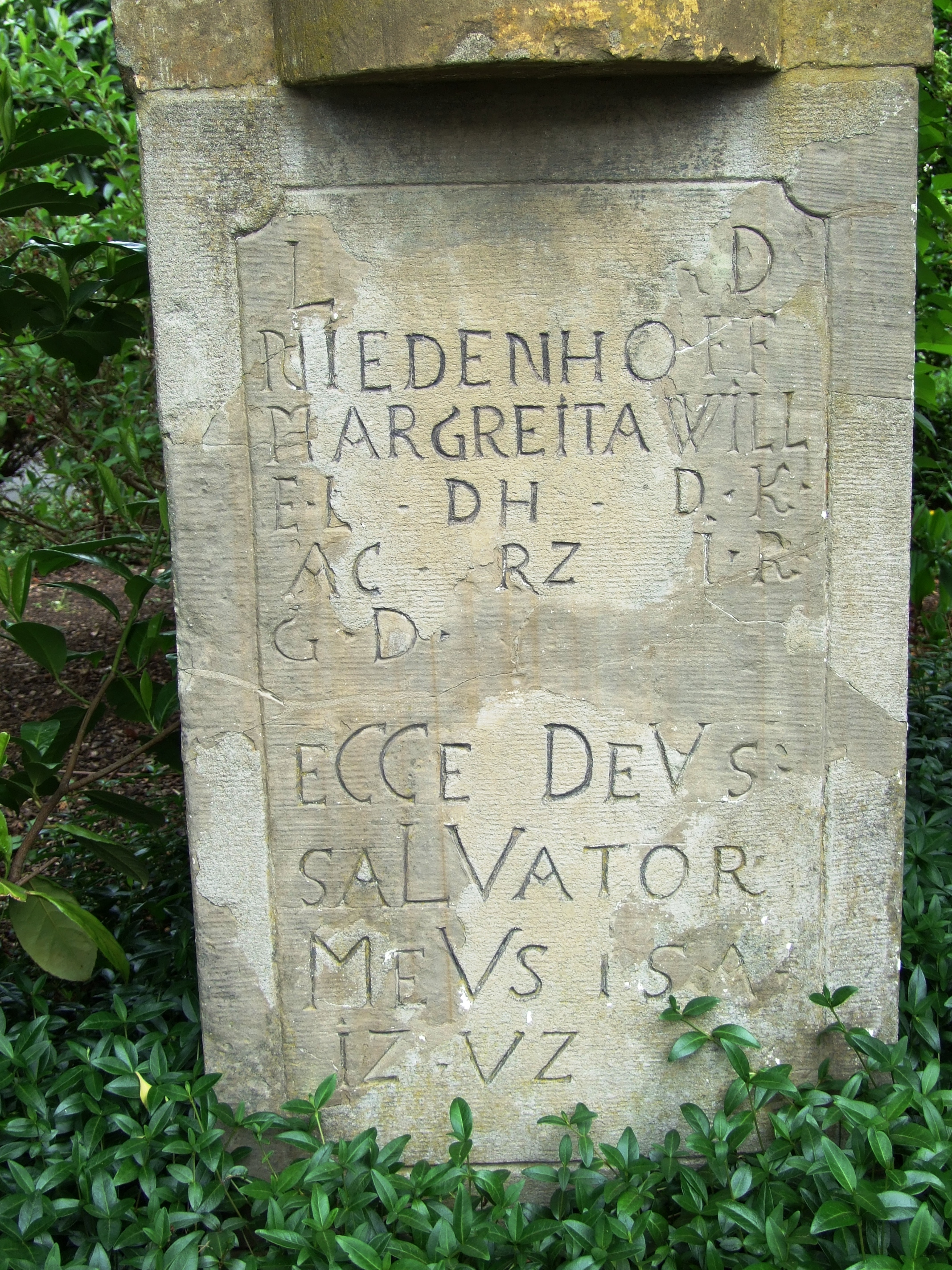 Bergisch Gladbach, Denkmal Nr. 34, Inschrift